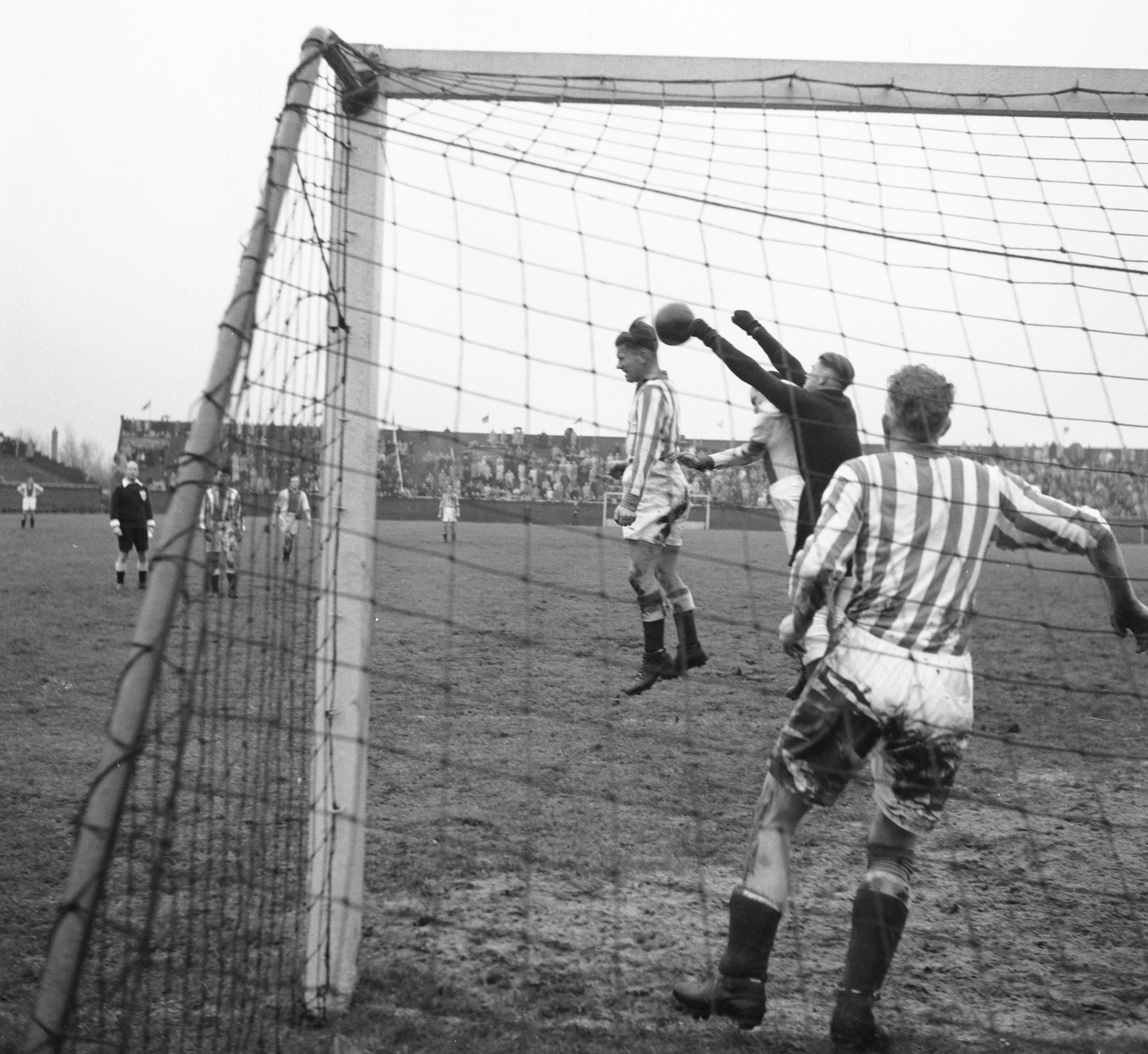 Collectie / Archief : Fotocollectie Anefo Reportage / Serie : [ onbekend ] Beschrijving : Ajax tegen Wageningen 0-0 Datum : 21 januari 1951 Trefwoorden : sport, voetbal Instellingsnaam : AJAX Fotograaf : Noske, J.D. / Anefo Auteursrechthebbende : Nationaal Archief Materiaalsoort : Negatief (zwart/wit) Nummer archiefinventaris : bekijk toegang 2.24.01.03 Bestanddeelnummer : 904-4032